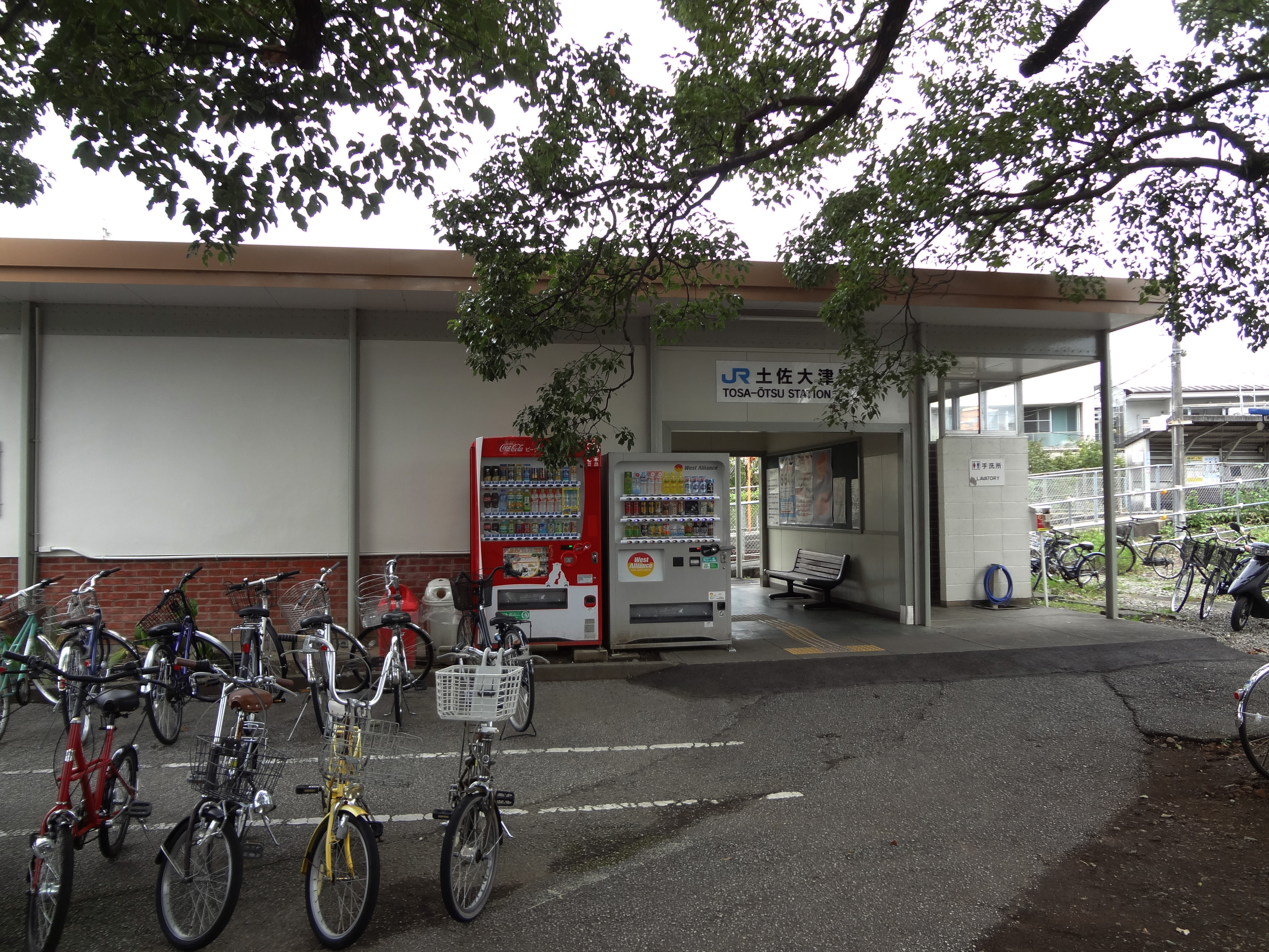 土佐大津駅舎